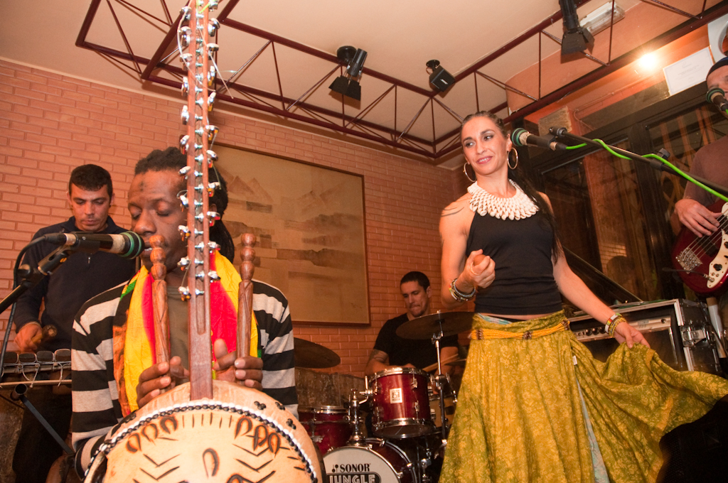 Espanol: Actuación del grupo de música africana YARAMÁ en el Pub Didoro, el Sábado 22 de Noviembre con motivo del 14 día de la música (Santa Cecilia).